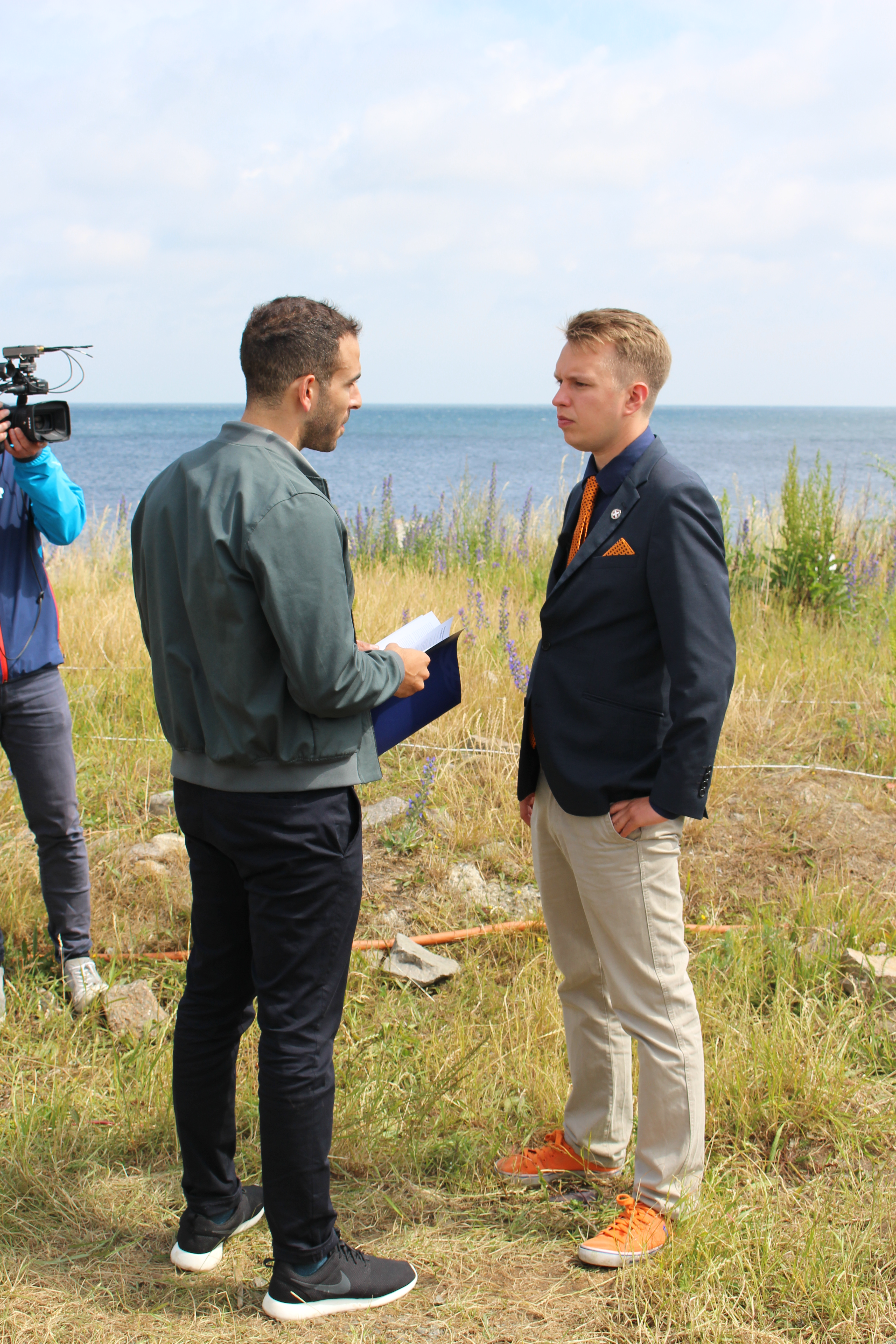 Abdel Aziz Mahmoud og partileder Daniel Carlsen i samtale under optagelsen af tv-programmet 'Daniel Carlsen for danskerne - Adgang med Abdel' ved Folkemødet 2016 på Allinge Kæmpestrand.